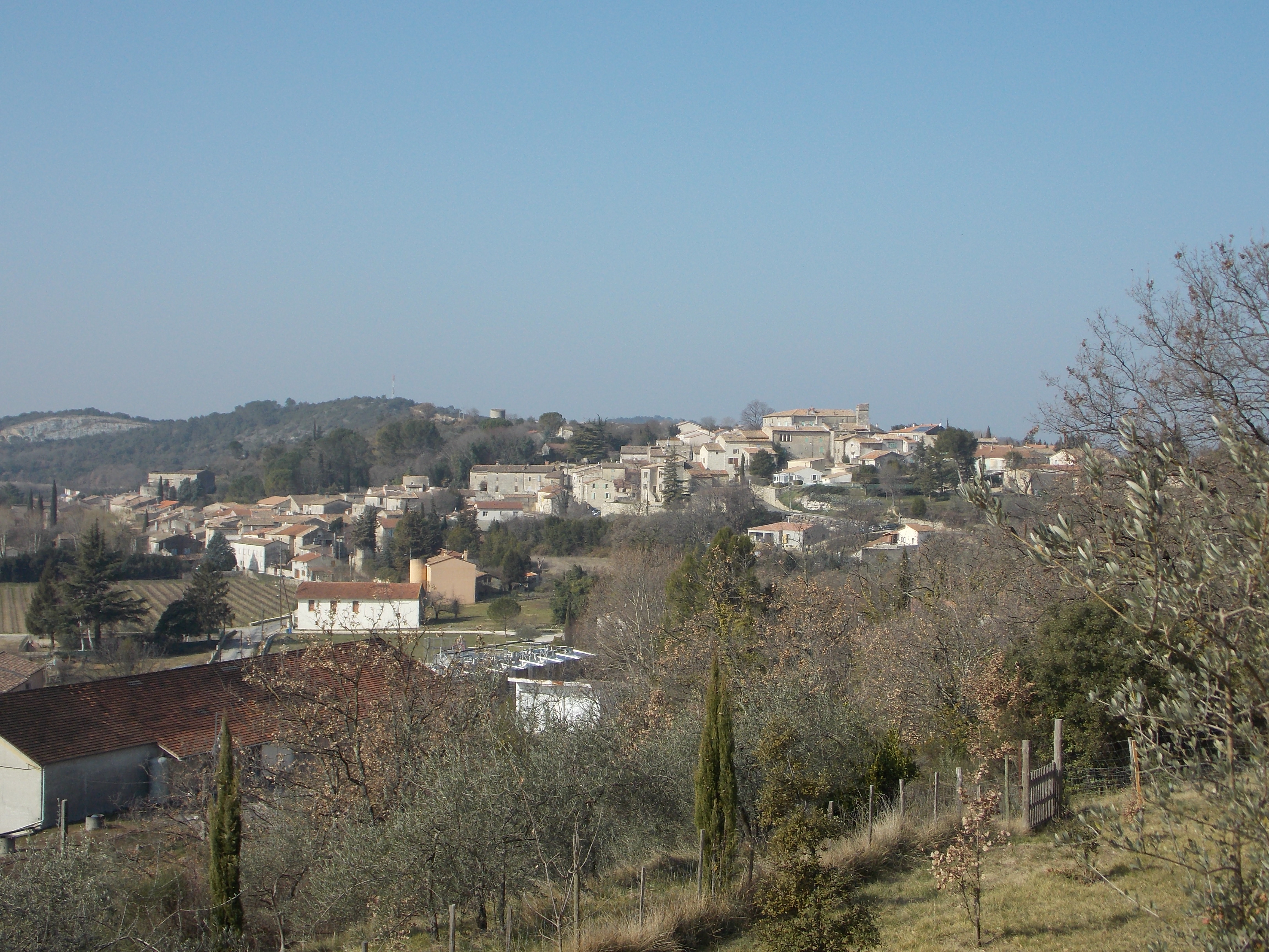 Vue du village de Ners.